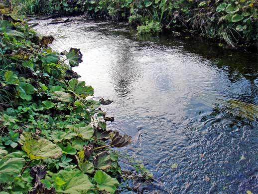 Nevengeul van de Schipbeek bij stuw ten behoeve van vispassage